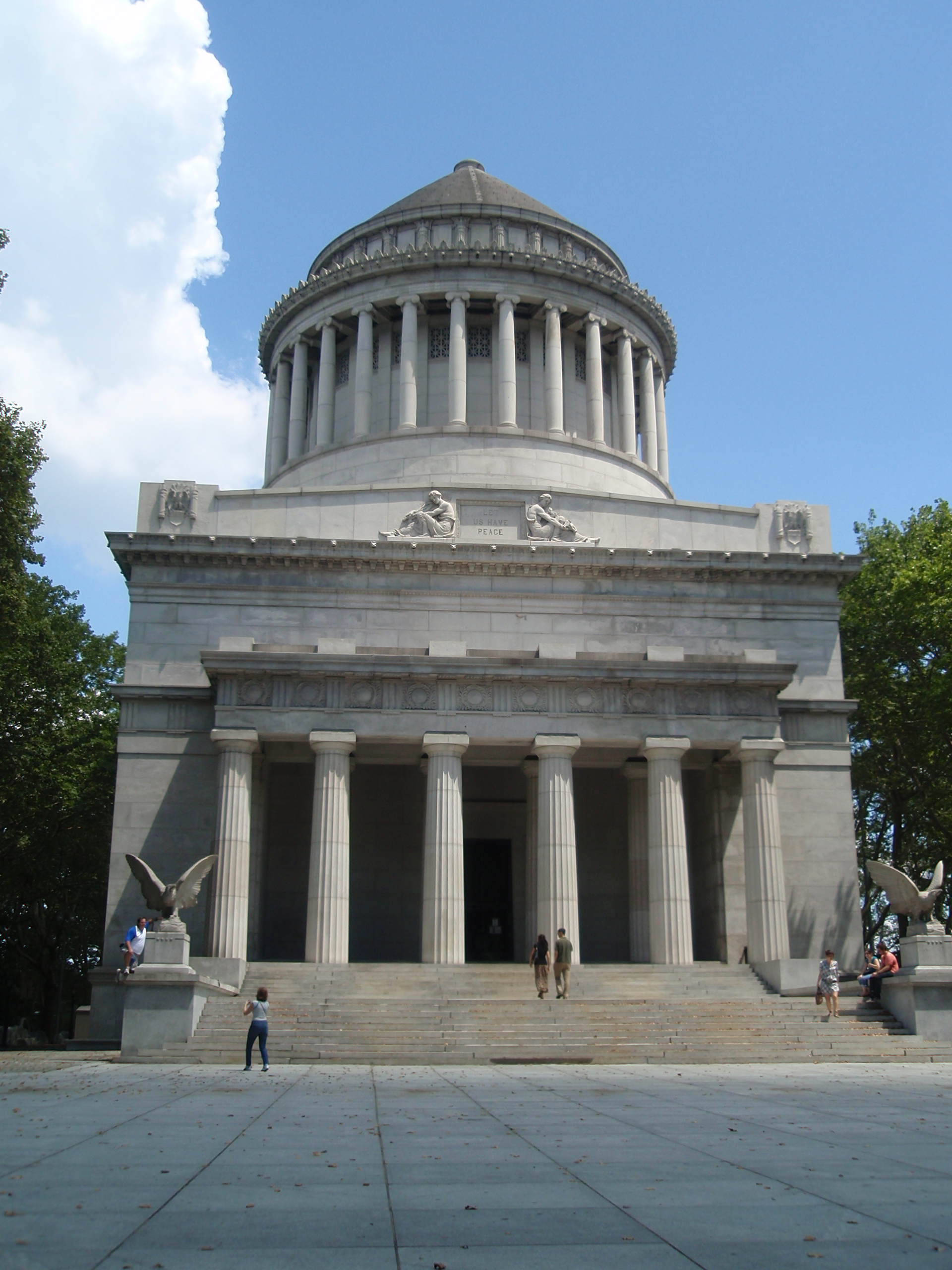 Grant's Tomb exterior